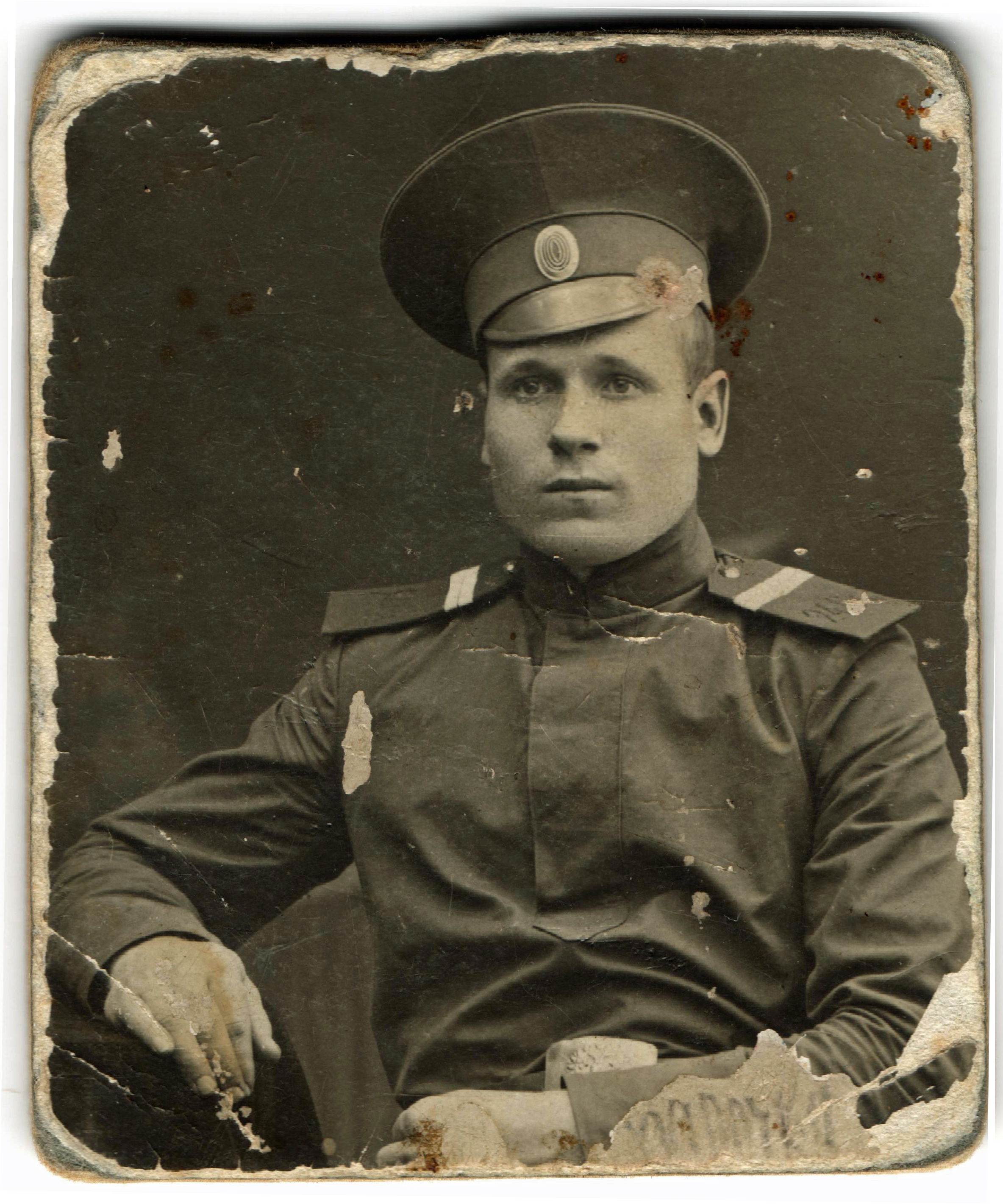 Петров Иван Михайлович